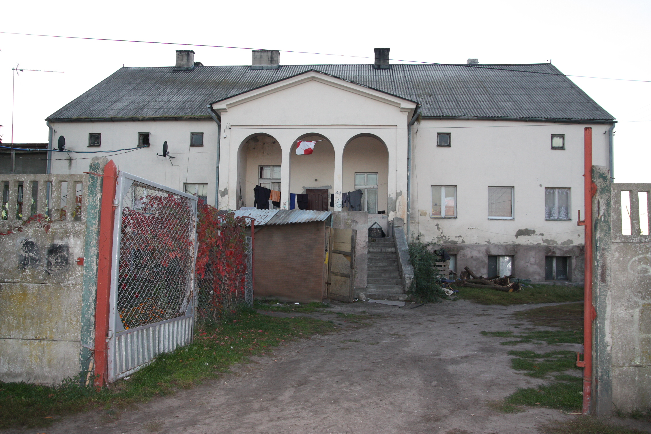 Latkowo - zespół dworski, poł. XIX w.: dwór